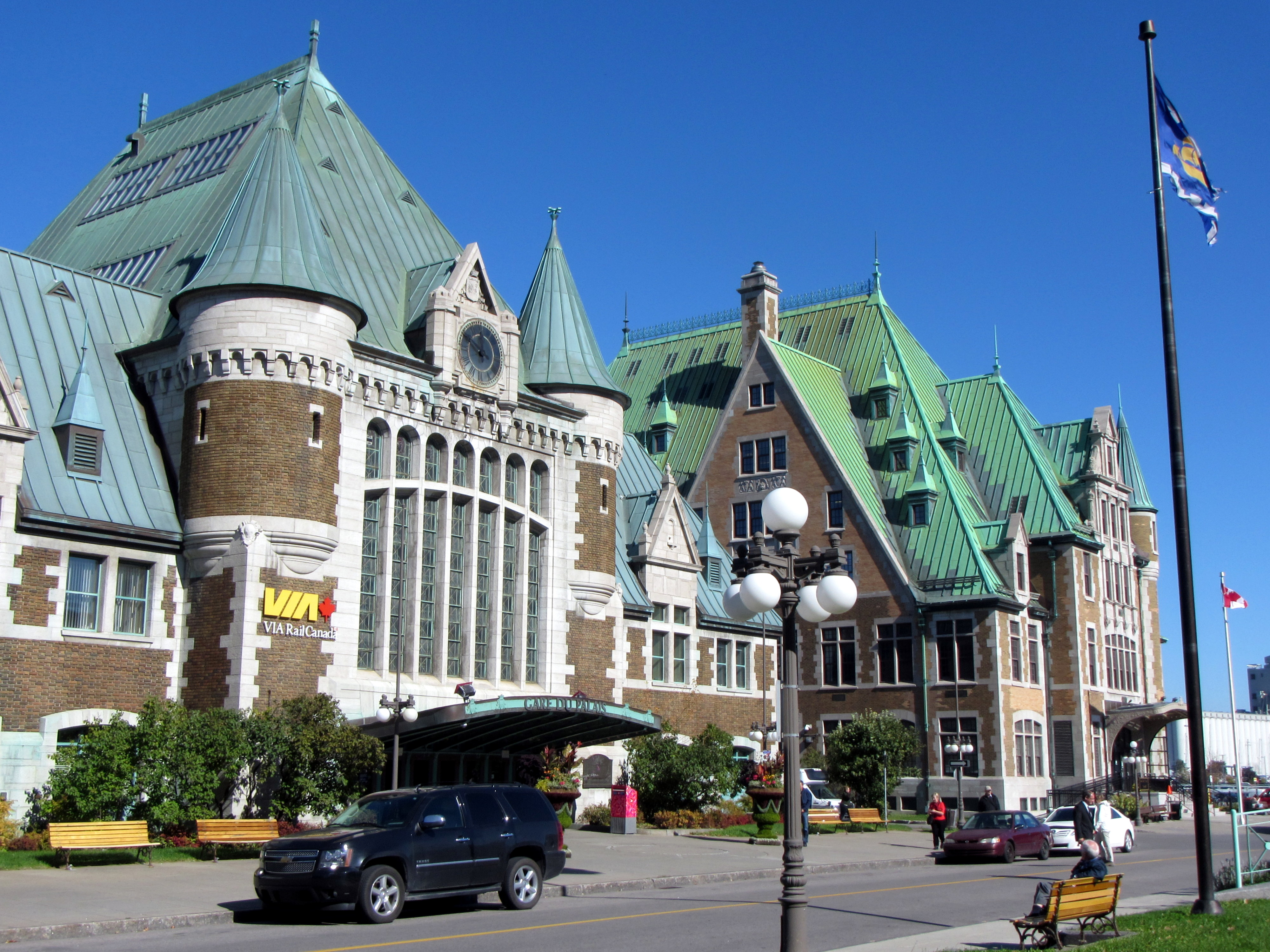 Gare du Palais